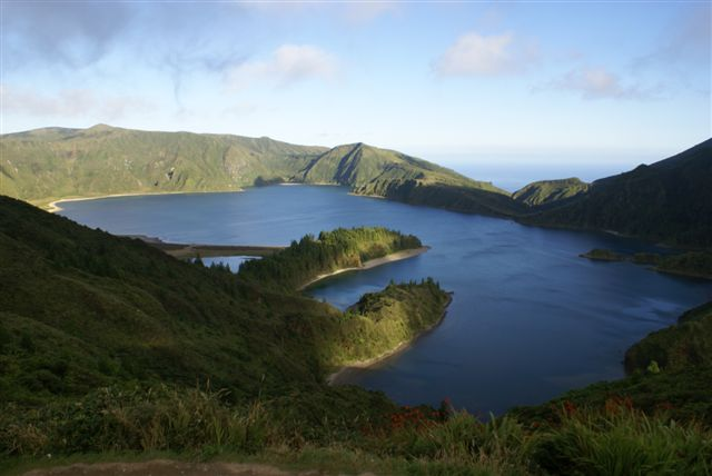 Lagoa do Fogo, Miradouro da Serra da Barrosa, ilha de São Miguel, Portugal.